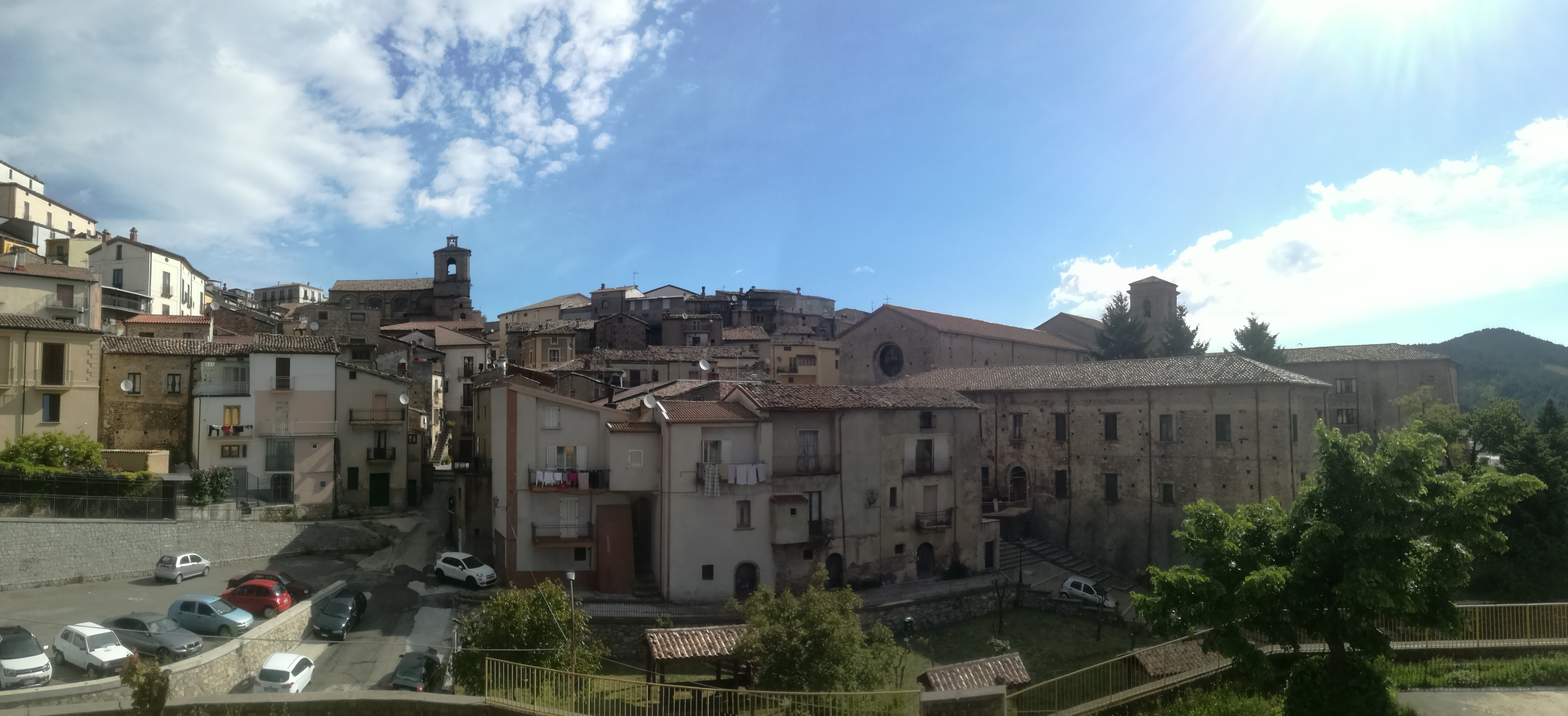 Foto Panoramica centro storico di San Giovanni in Fiore